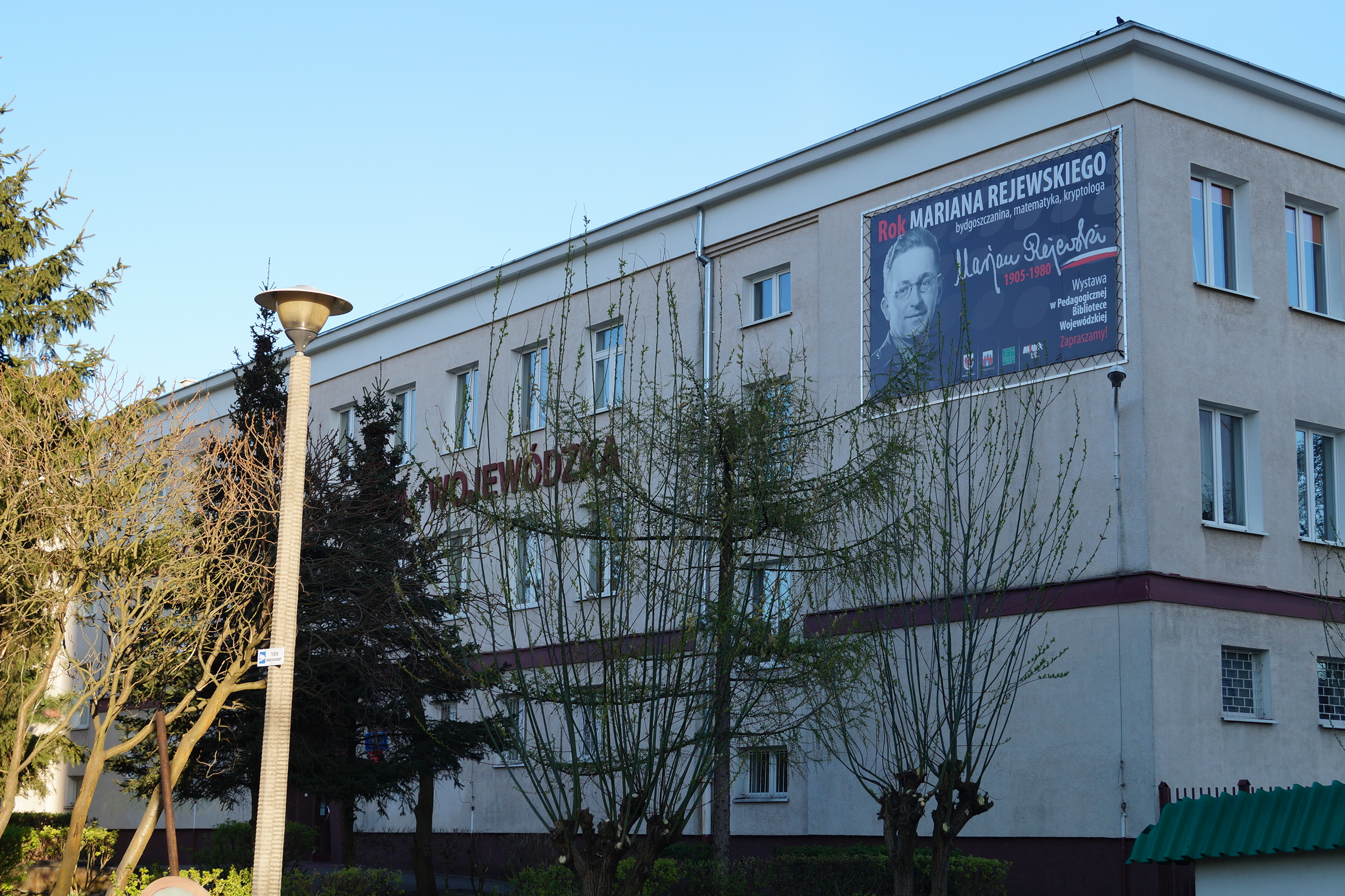 Banner "Rok Mariana Rejewskiego" na budynku Pedagogicznej Biblioteki Wojewódzkiej w Bydgoszczy